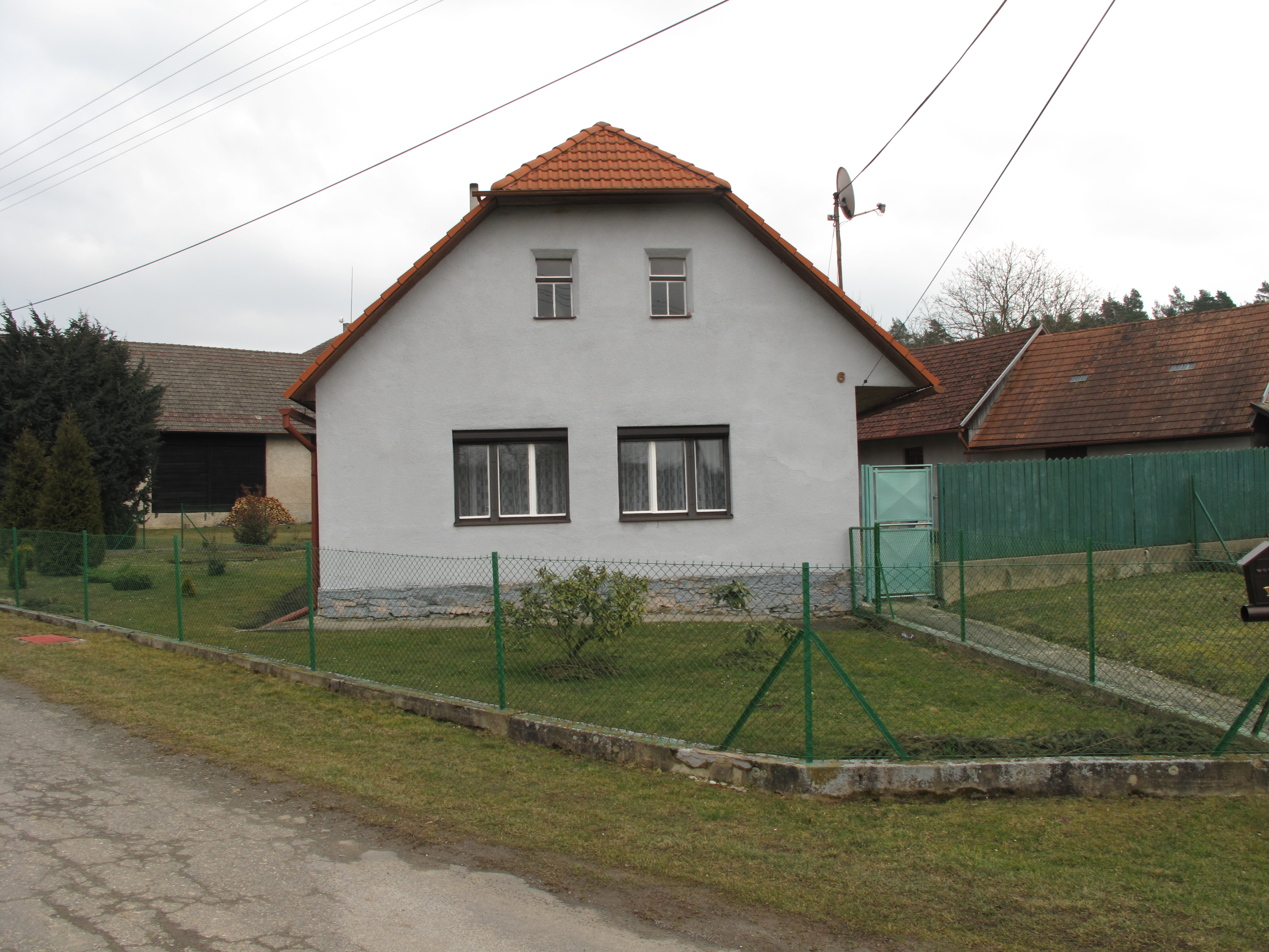 Dům v Zahájí. Okres Havlíčkův Brod, Česká republika.